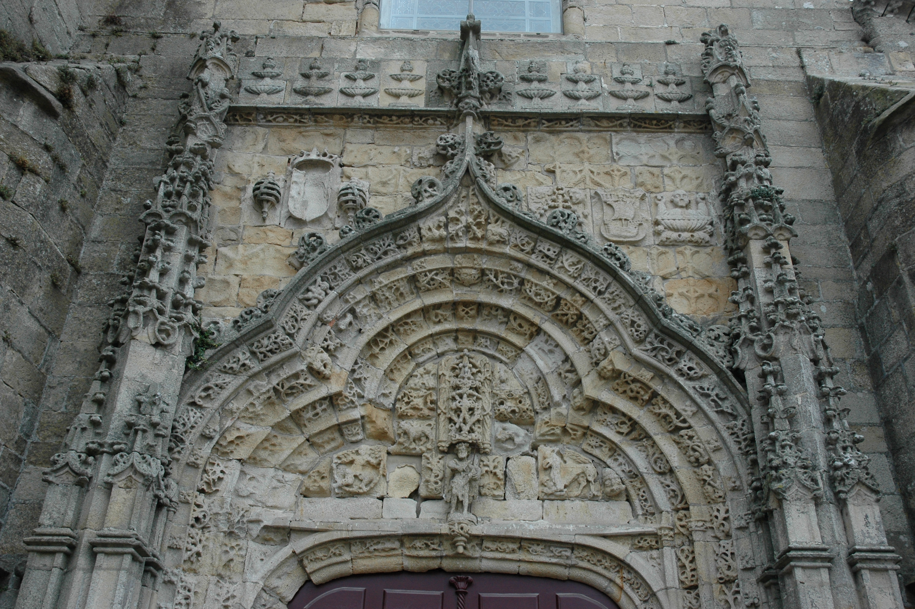 Vila do Conde - Detall pòrtic manuelí església